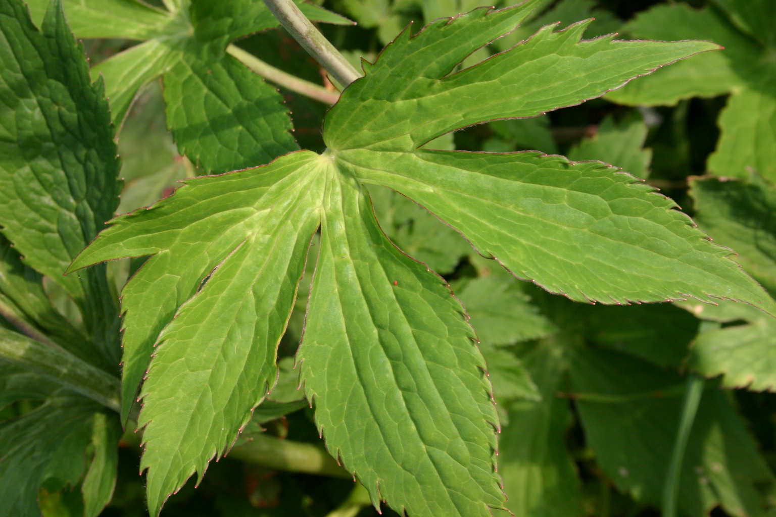 Platanen-Hahnenfuß (Ranunculus platanifolius) Aufnahmeort: Präbichl bei Eisenerz, Steiermark, Austria